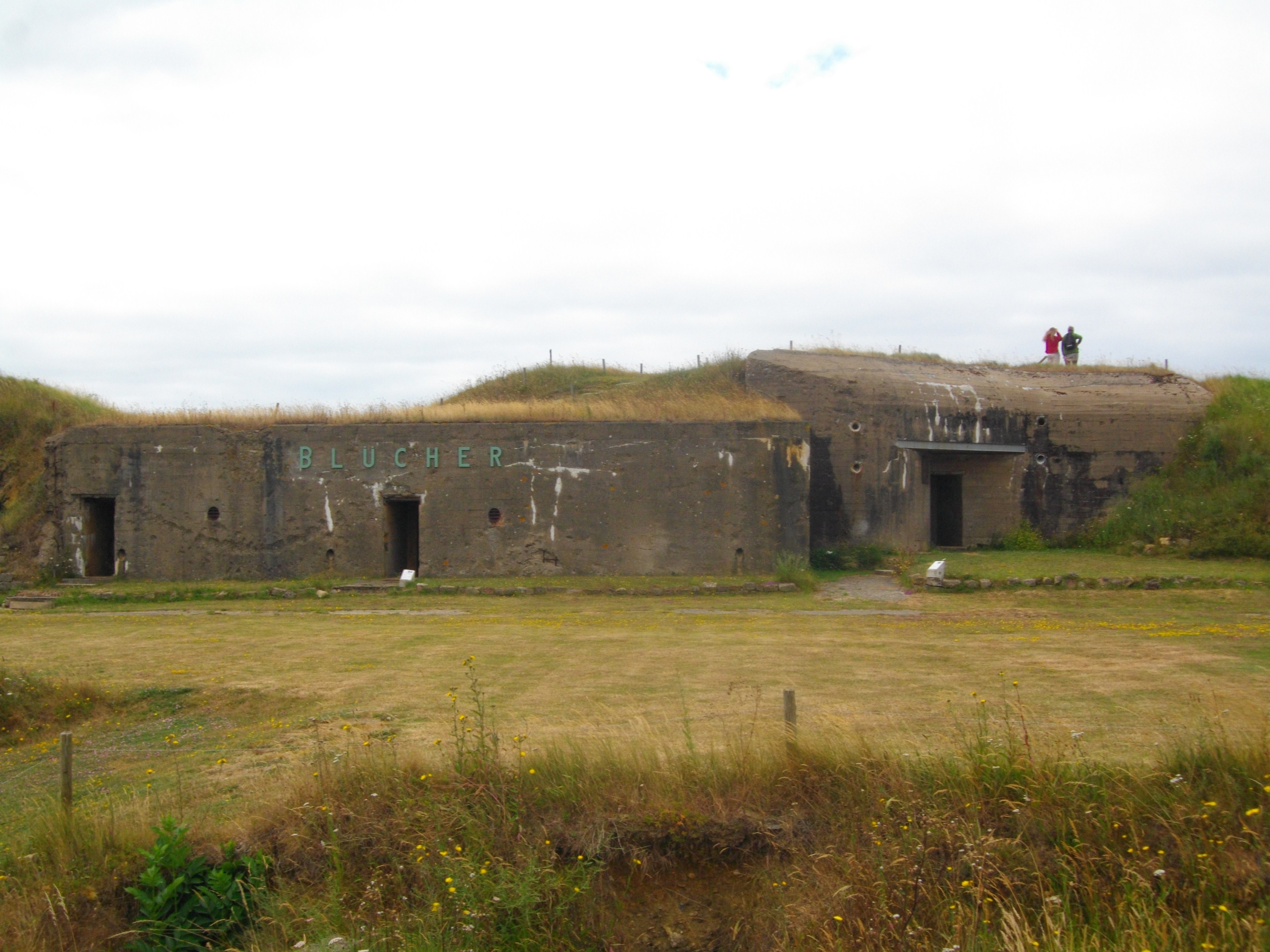 Abri derrière la pièce 3.